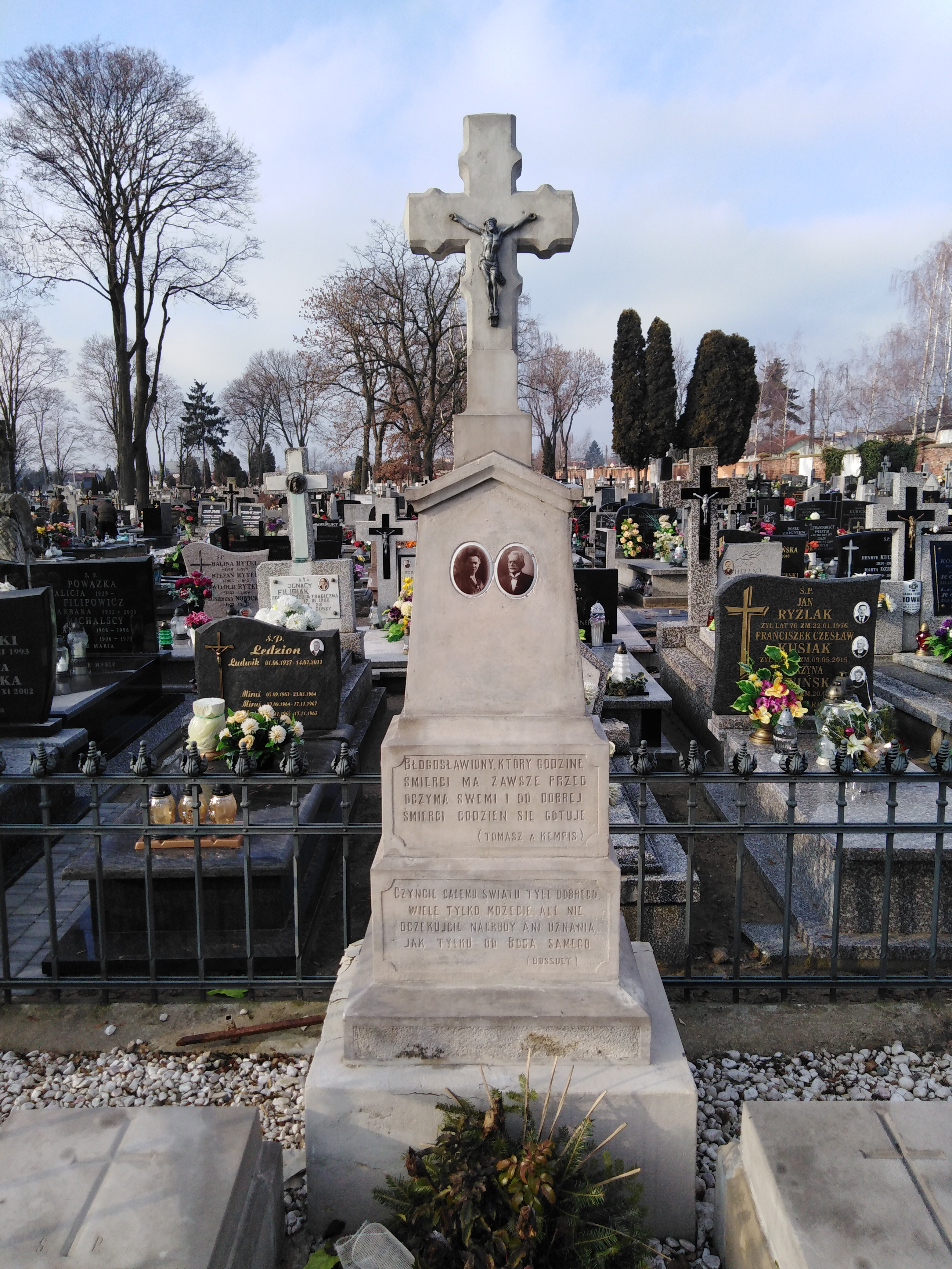 Nagrobek doktora Antoniego Troczewskiego na cmentarzu parafialny w Kutnie